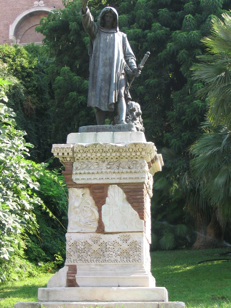 Denkmal Cola di Rienzi - Rom